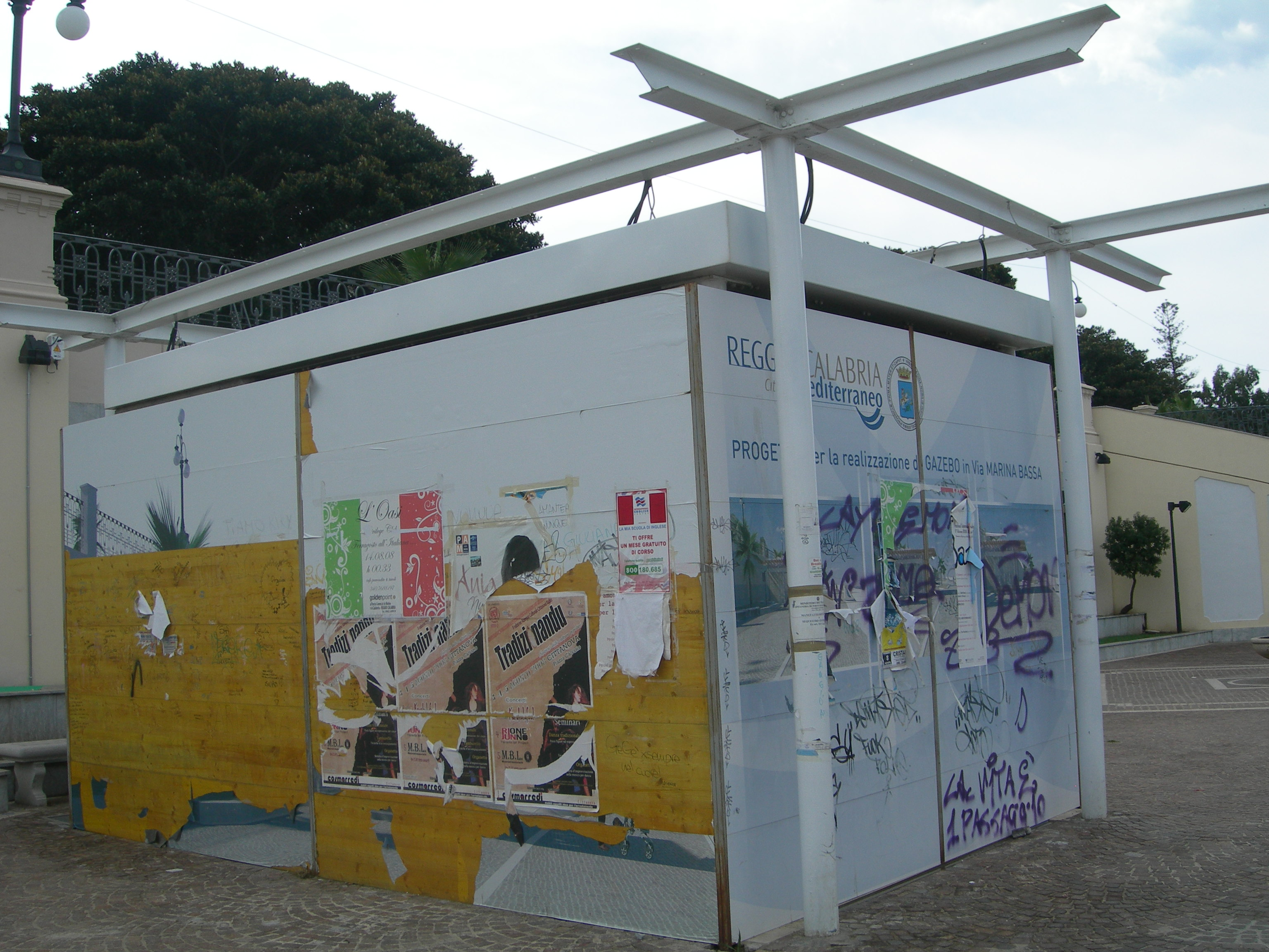 Realizzazione di un Gazebo in via Marina Bassa - Reggio Calabria